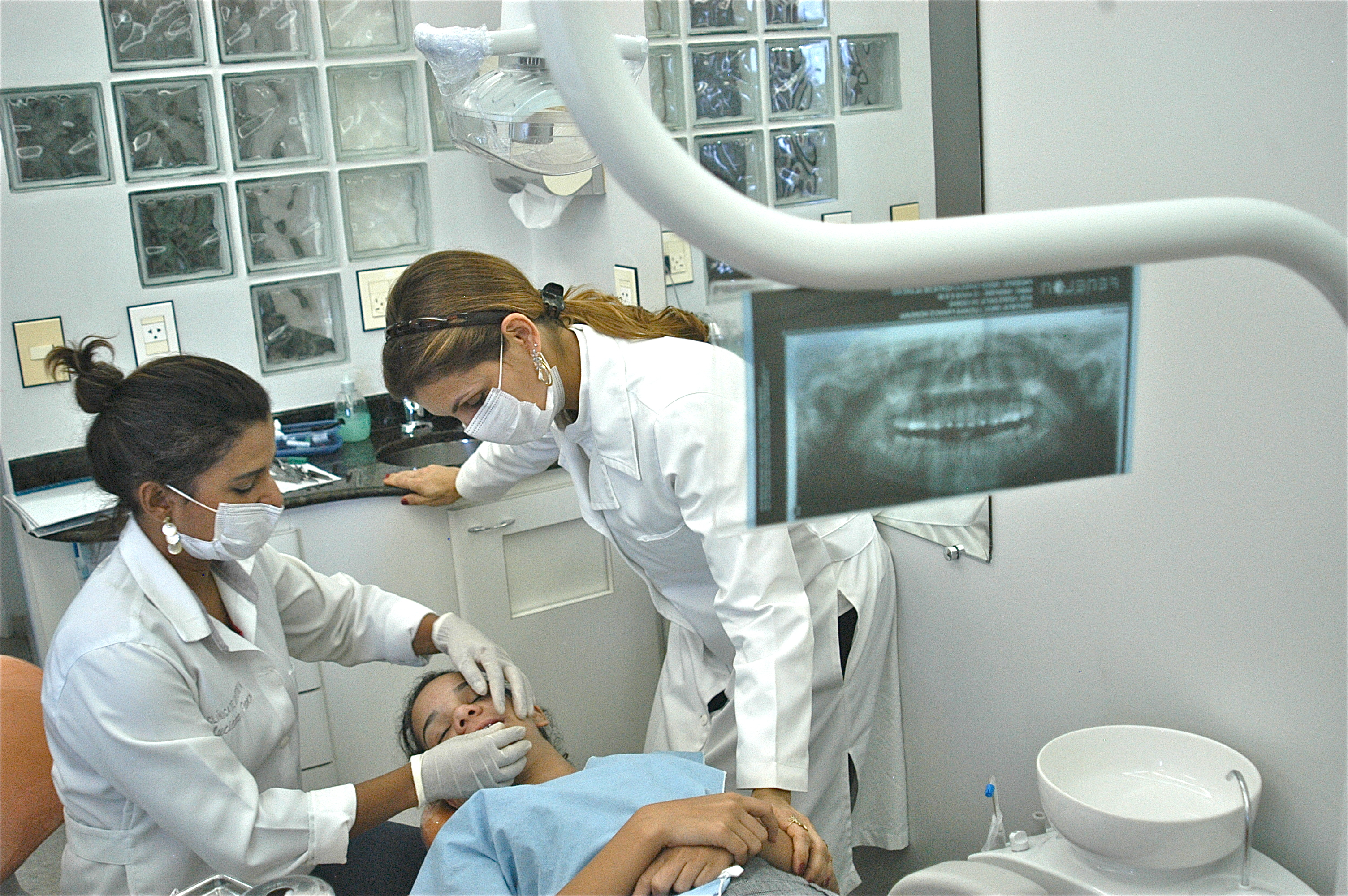 especialista em ortodontia ajusta aparelho ortodôntico.